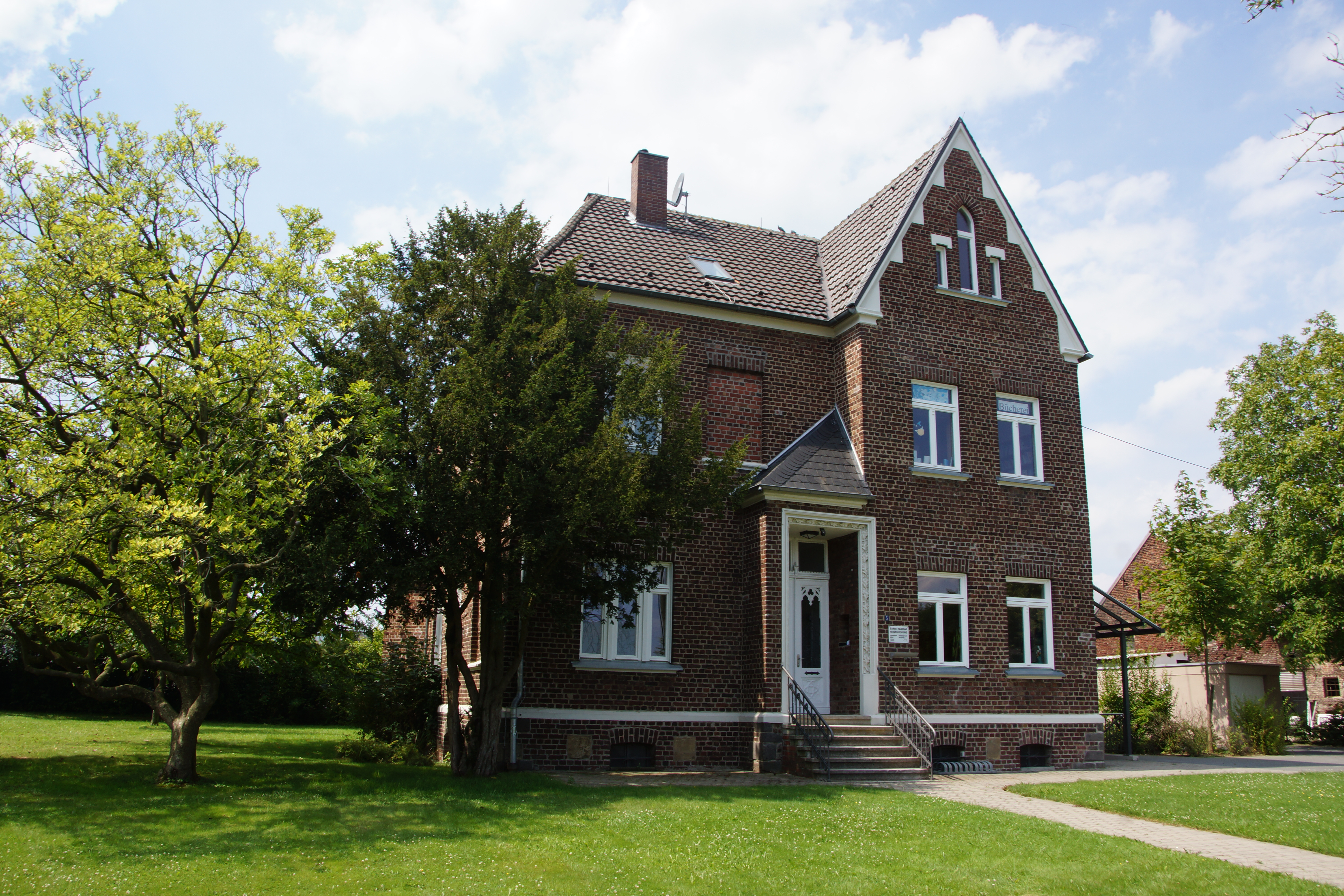 Pfarrheim der Kirchengemeinde St. Mariä Heimsuchung mit Bücherei, Marienkirchstraße 5, Rott, Stadt Hennef (Sieg)